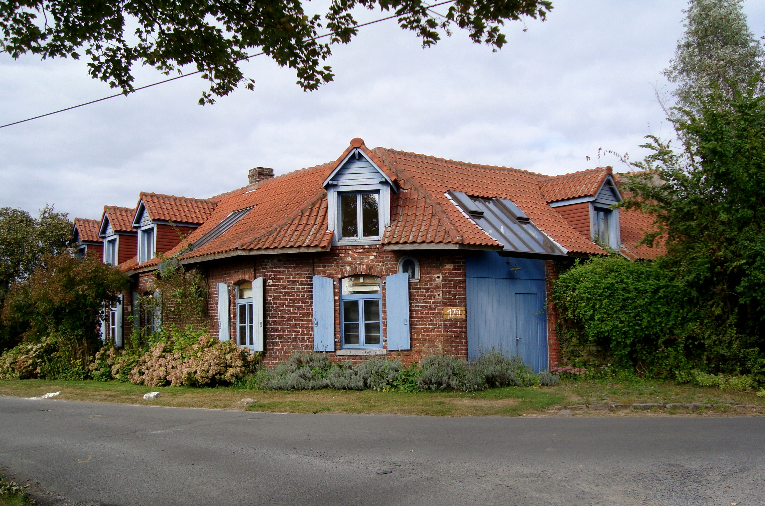 Une ferme au carré dans la campagne de Marcq-en-Baroeul (Nord).